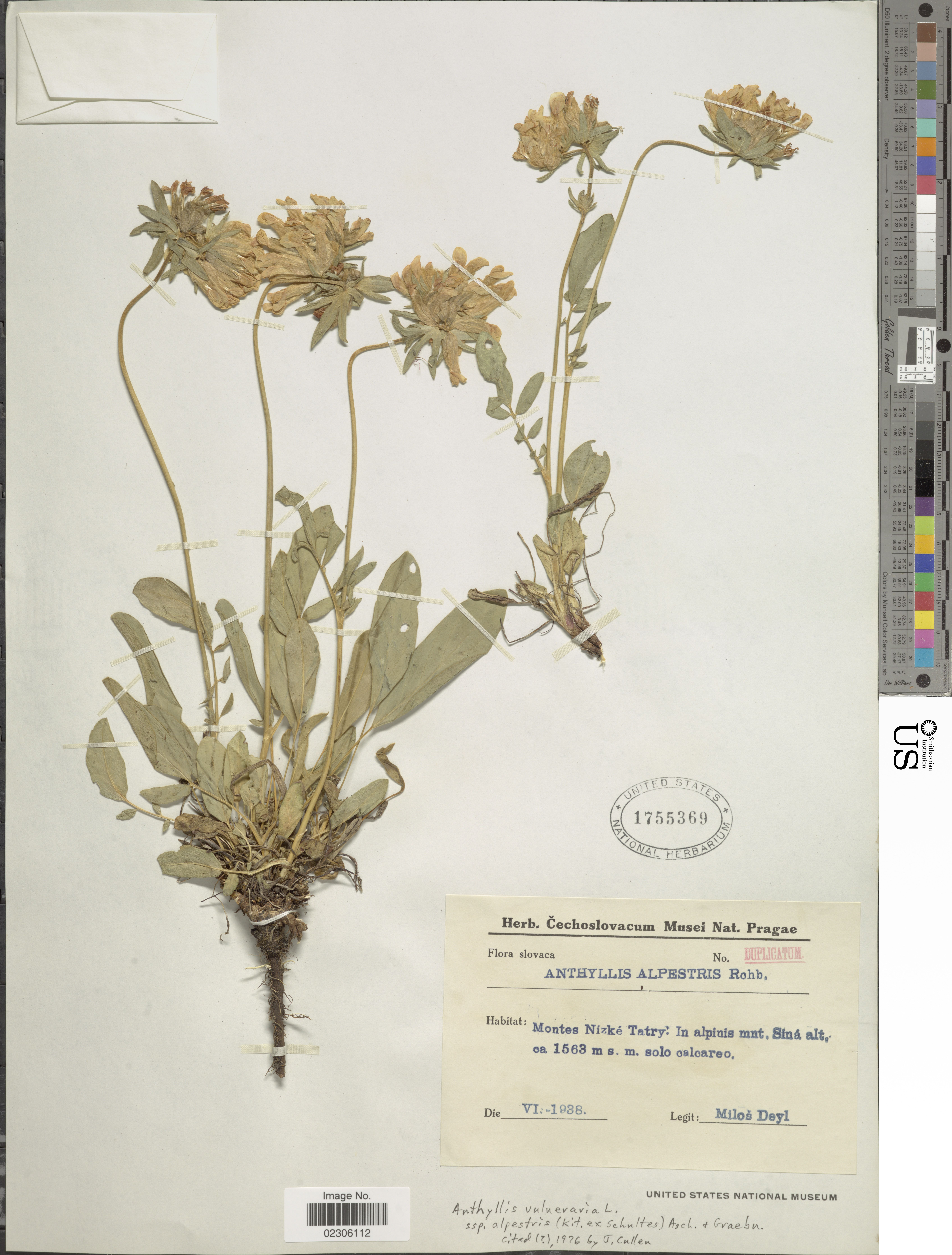 Anthyllis vulneraria subsp. alpestris del Smithsonian Institution, NMNH, Botany